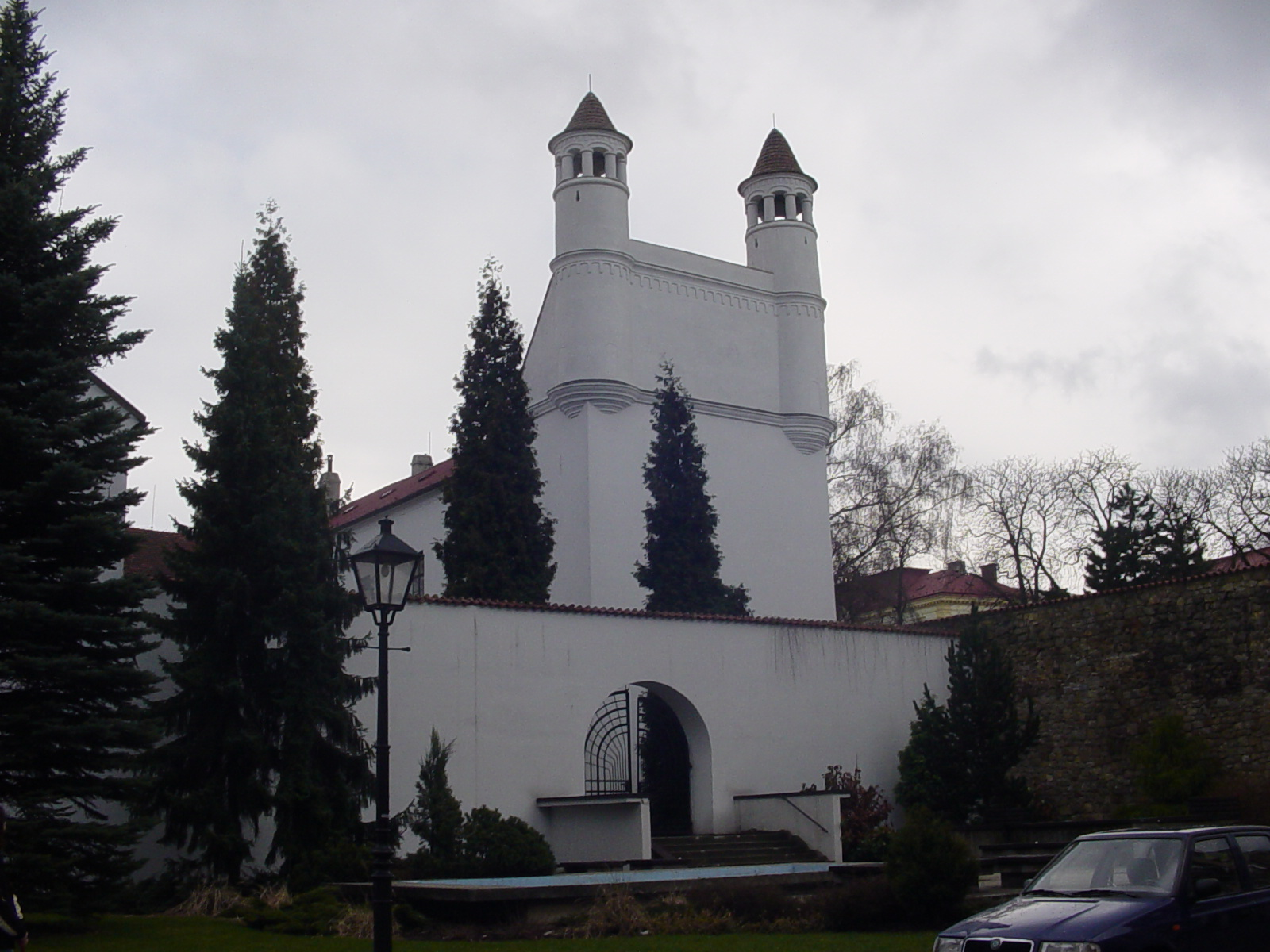 Žerotínský zámek